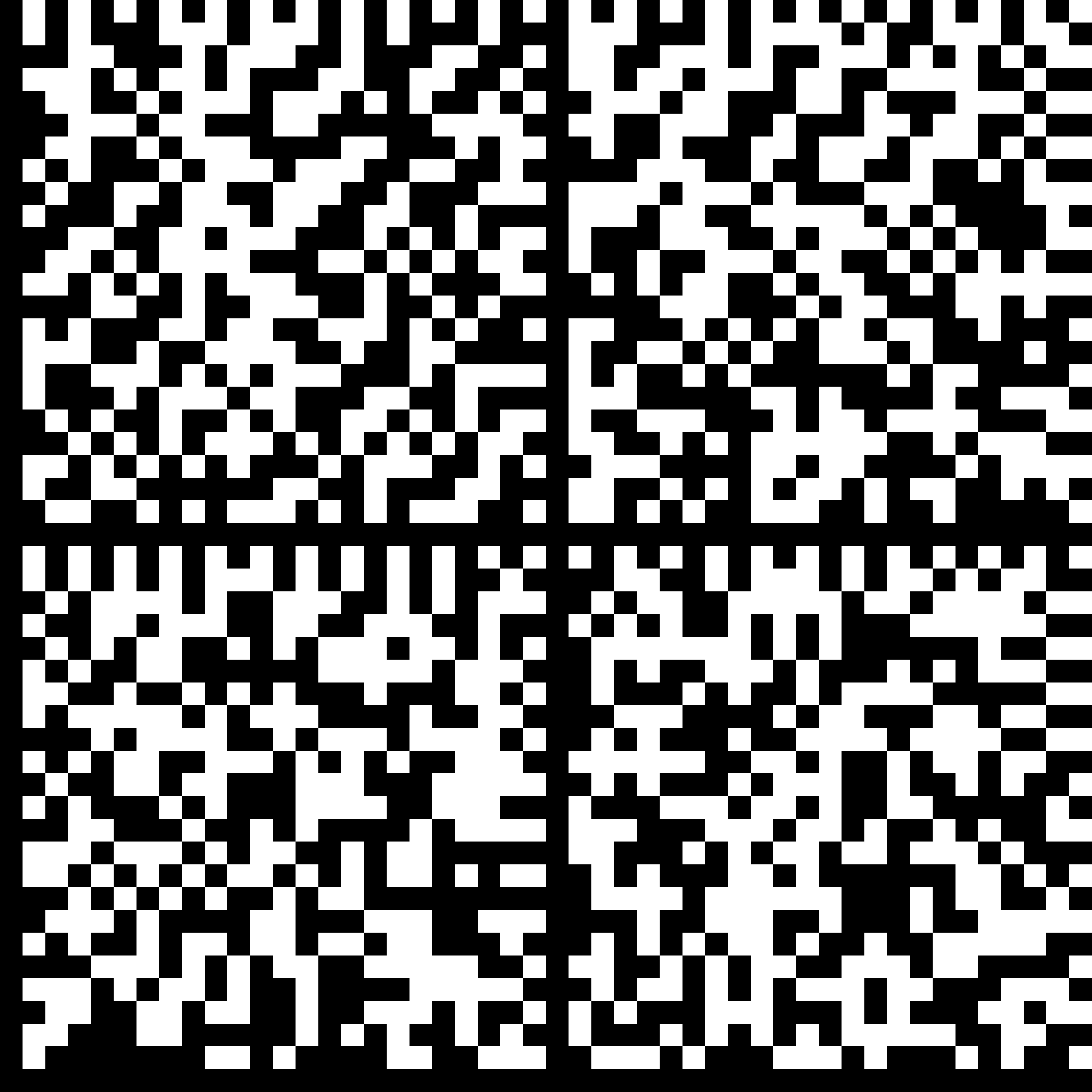 Datamatrix of "Lorem ipsum". Encoded text reads "Lorem ipsum dolor sit amet, consectetur adipisicing elit, sed do eiusmod tempor incididunt ut labore et dolore magna aliqua. Ut enim ad minim veniam".